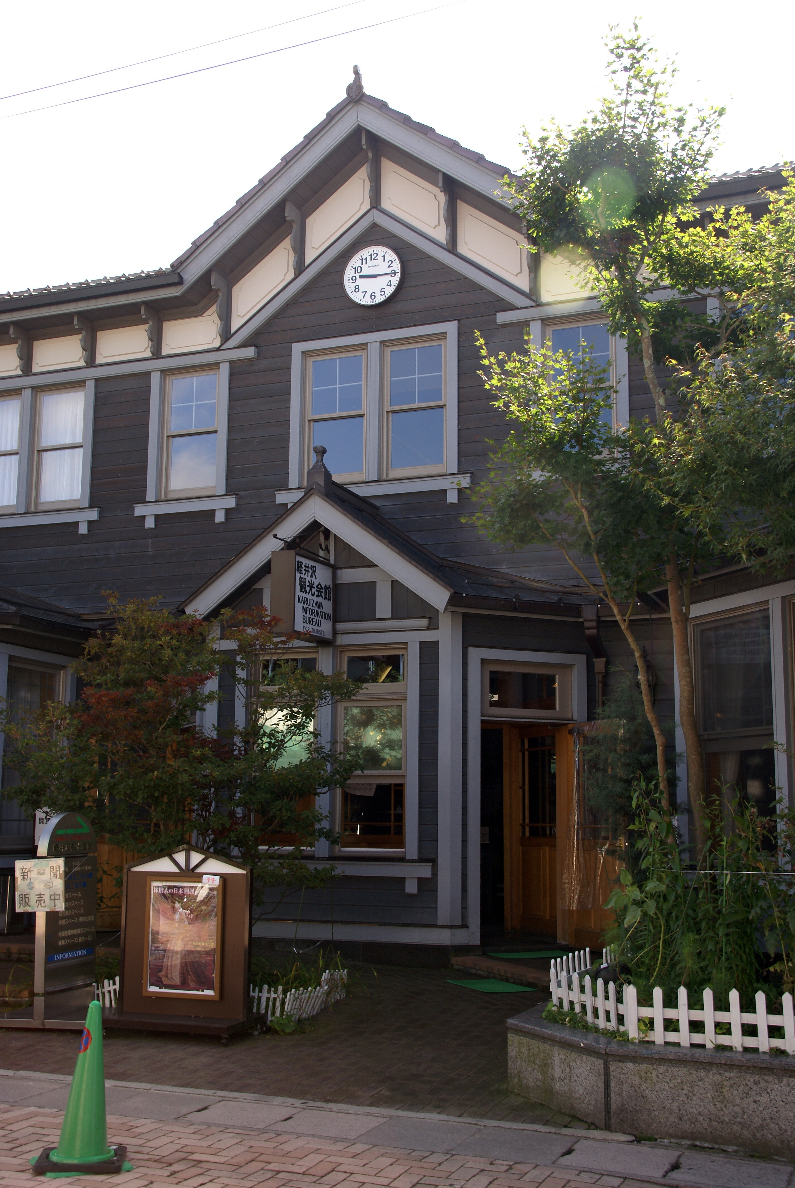 Old Karuizawa Ginza in Karuizawa, Nagano, Japan